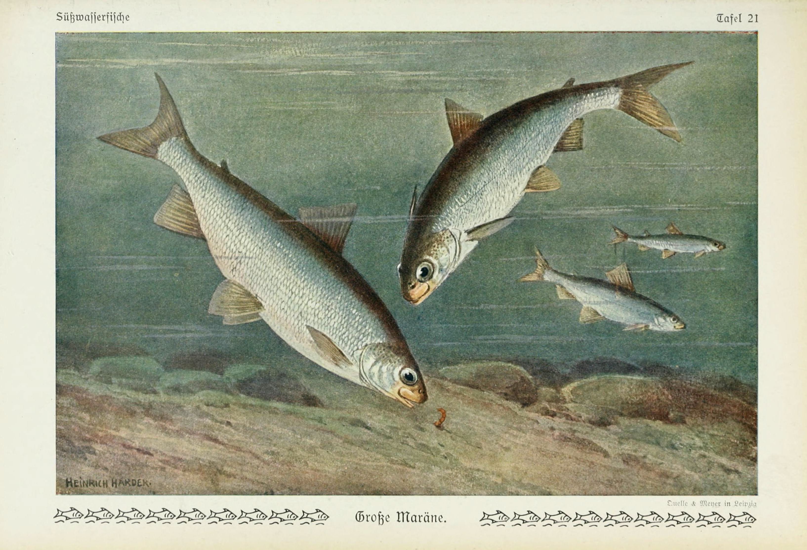 © & SS SS